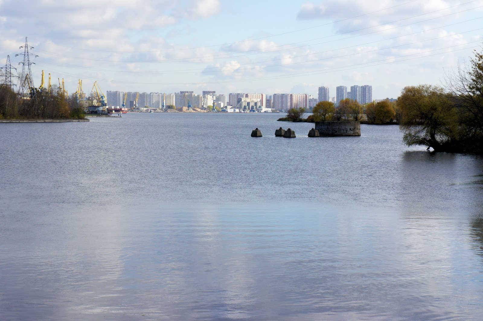 Нагатинская пойма.